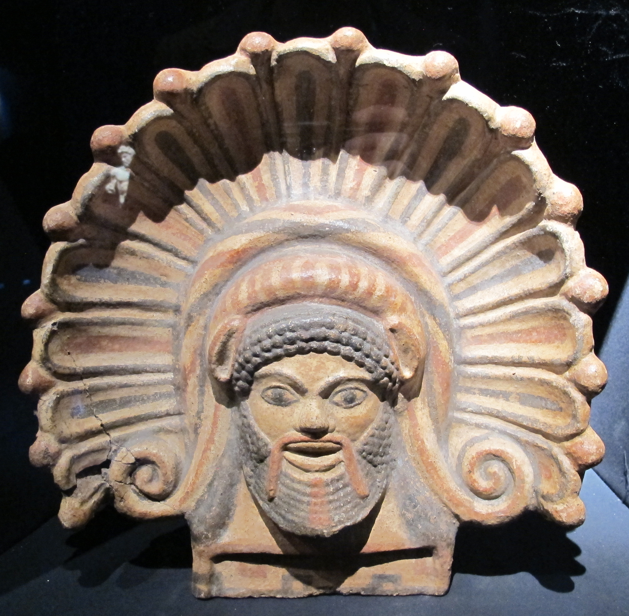 Monsters Exhibition (Palazzo Massimo, Rome, 2014)